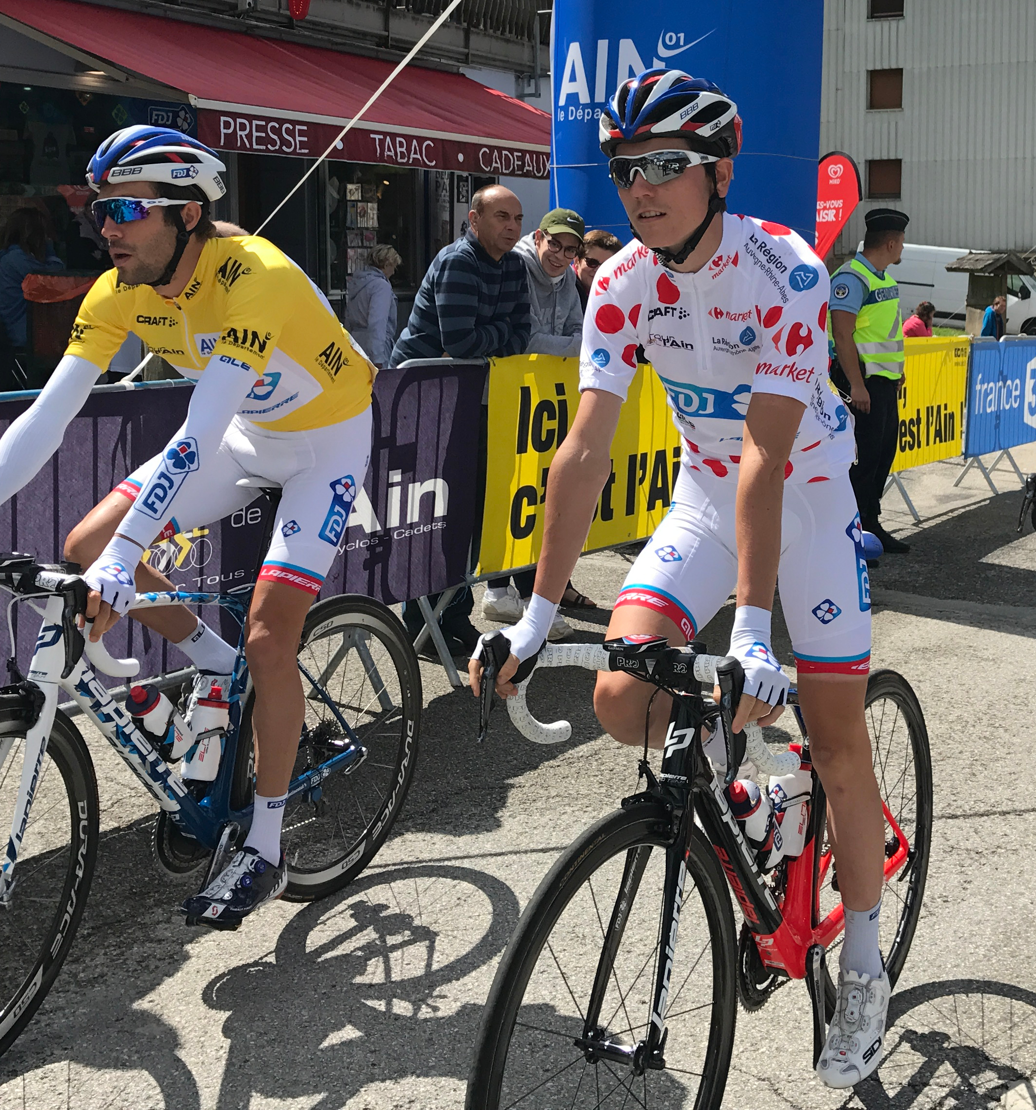 Tour de l'Ain 2017 - étape 4 - Lélex.